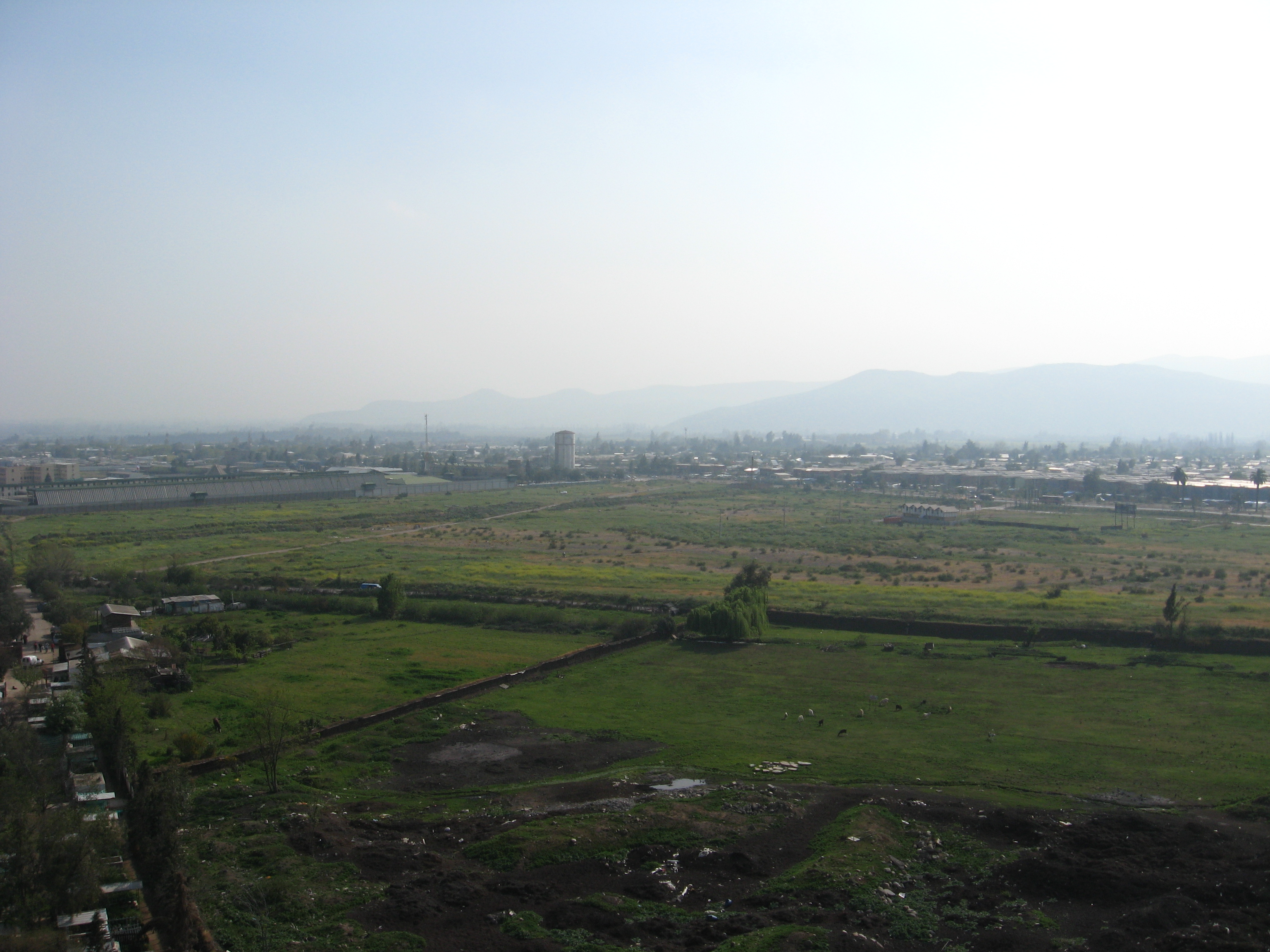 Vista de Colina Desde Cerro Comaico